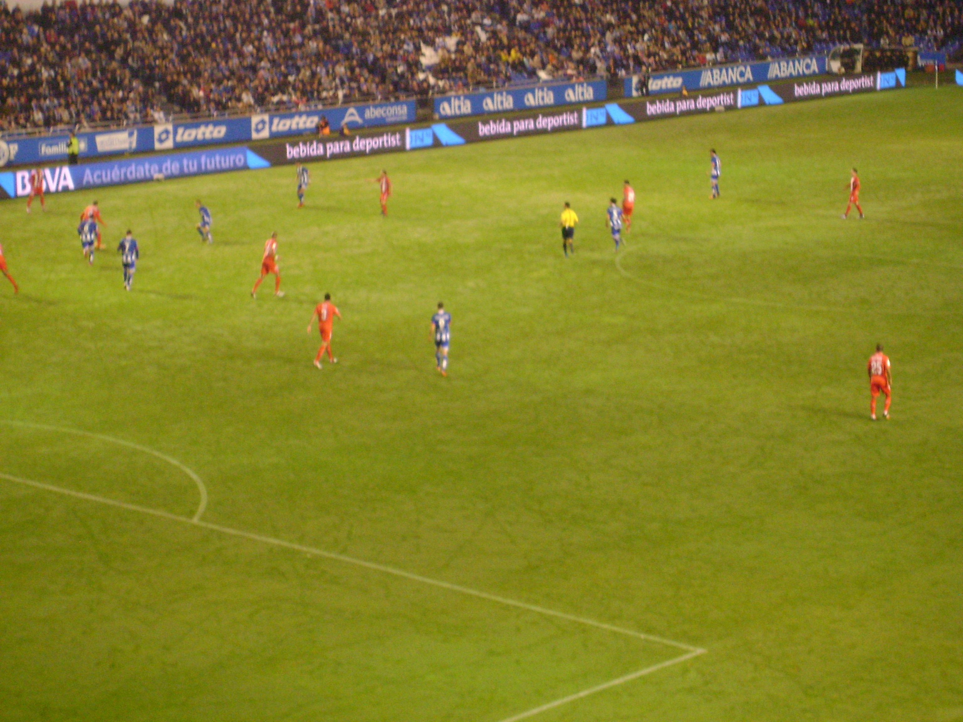 Deportivo vs. Sevilla FC